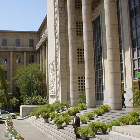 Ministerstvo spravedlnosti v Teheránu - vstupní část